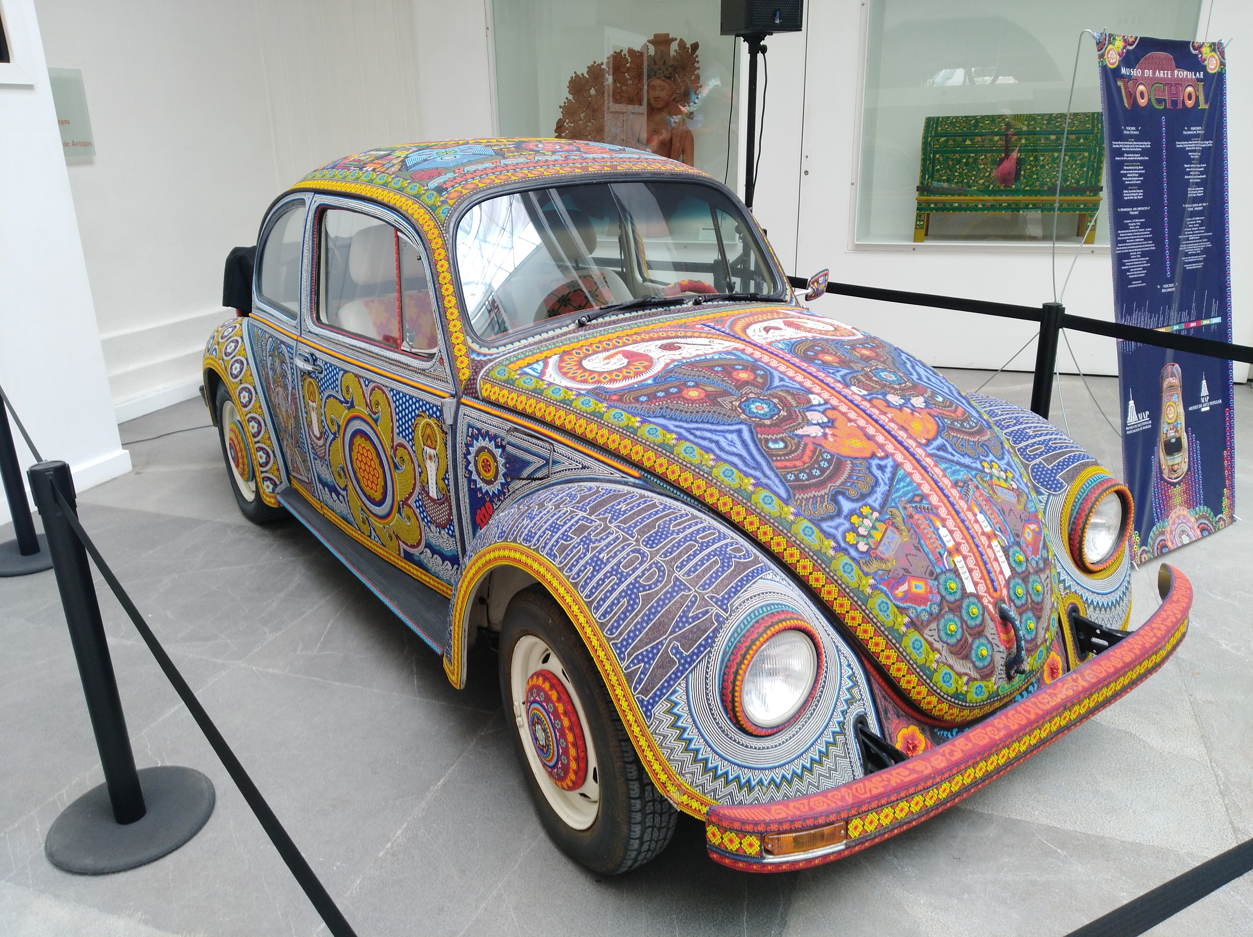 Volkswagen intervenido por artesanos huicholes. Se encuentra en el museo de arte popular.